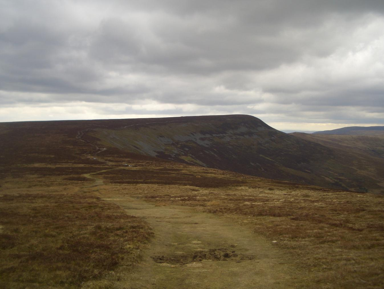 pen allt-mawr